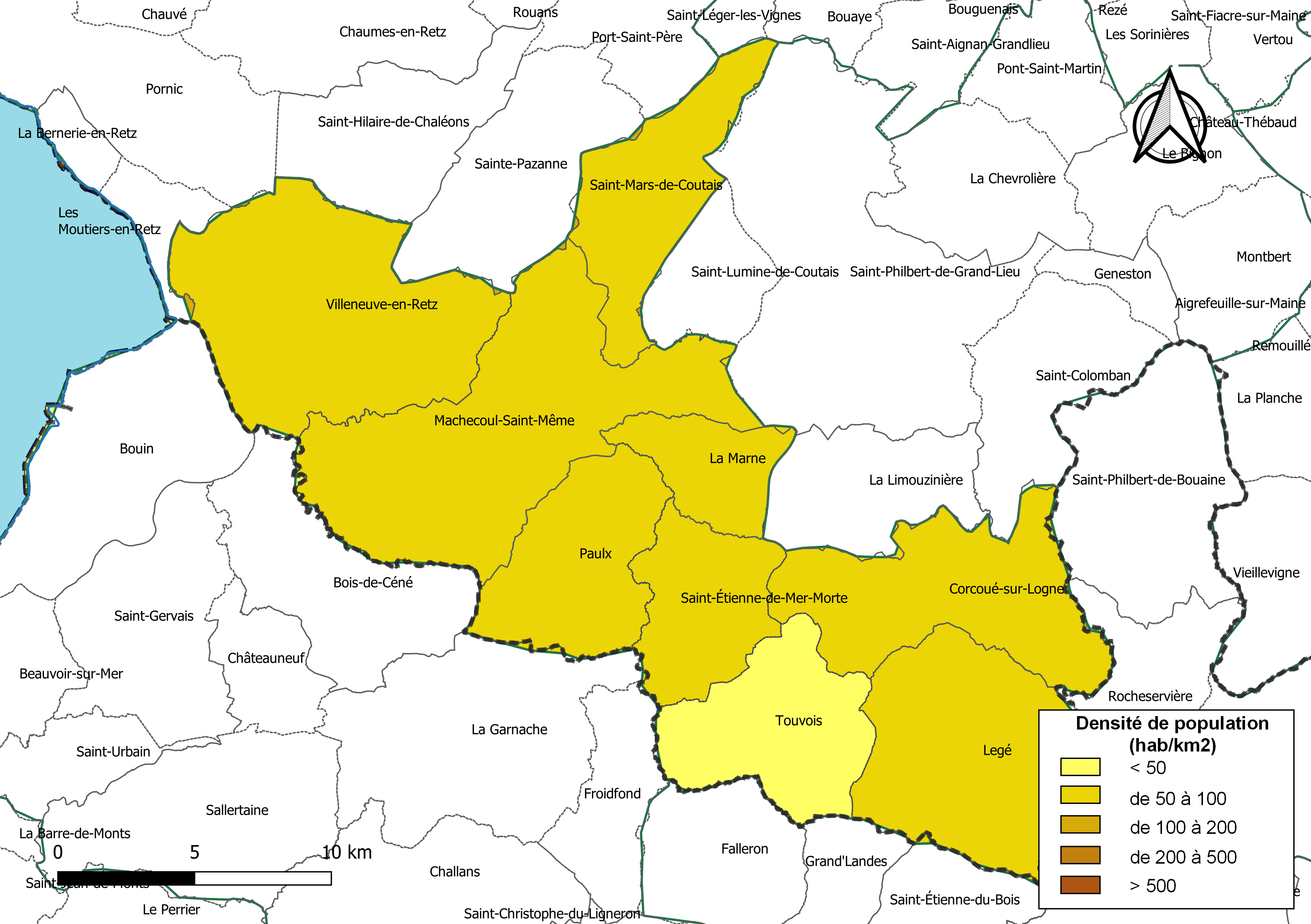 Carte des densités de population (millésimée 2016) des communes de la Communauté de communes Sud Retz Atlantique, département de la Loire-Atlantique, France. Composition au 1er janvier 2019.